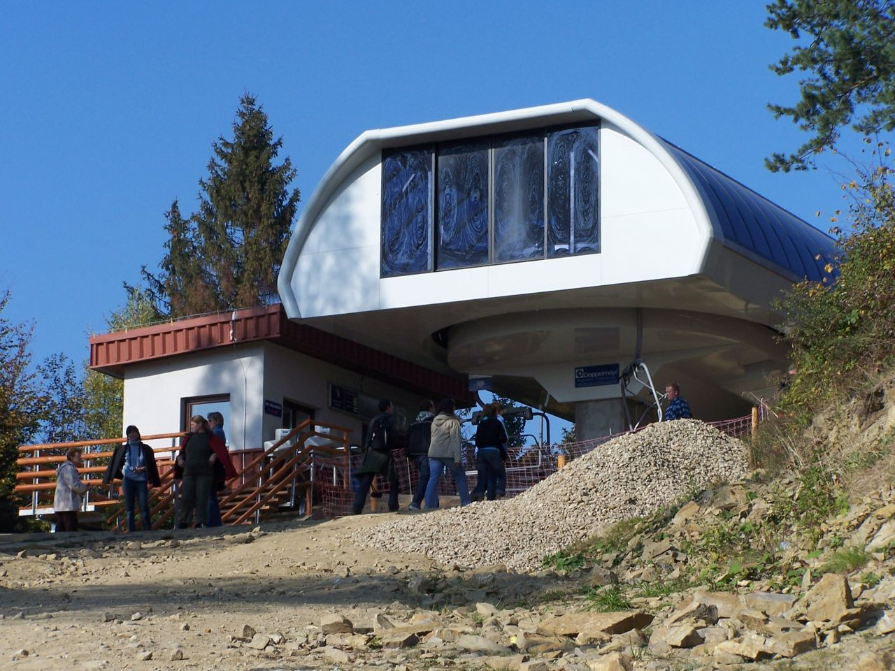 Górna stacja kolejki linowej na Palenicy w Szczawnicy